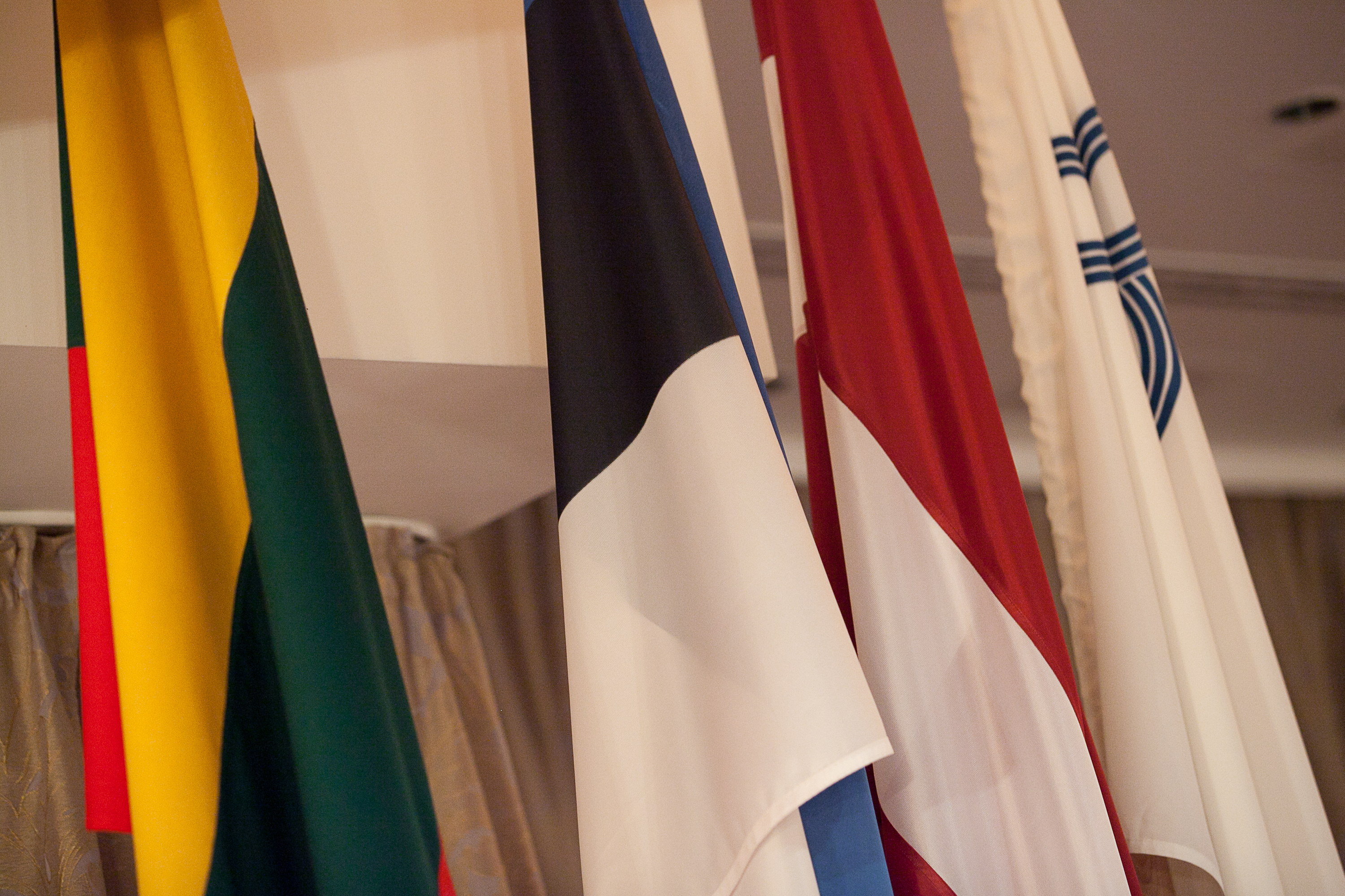 2012.gada 8.novembris. Baltijas Asamblejas medaļu pasniegšanas ceremonija. Foto: Ernests Dinka, Saeimas Kanceleja